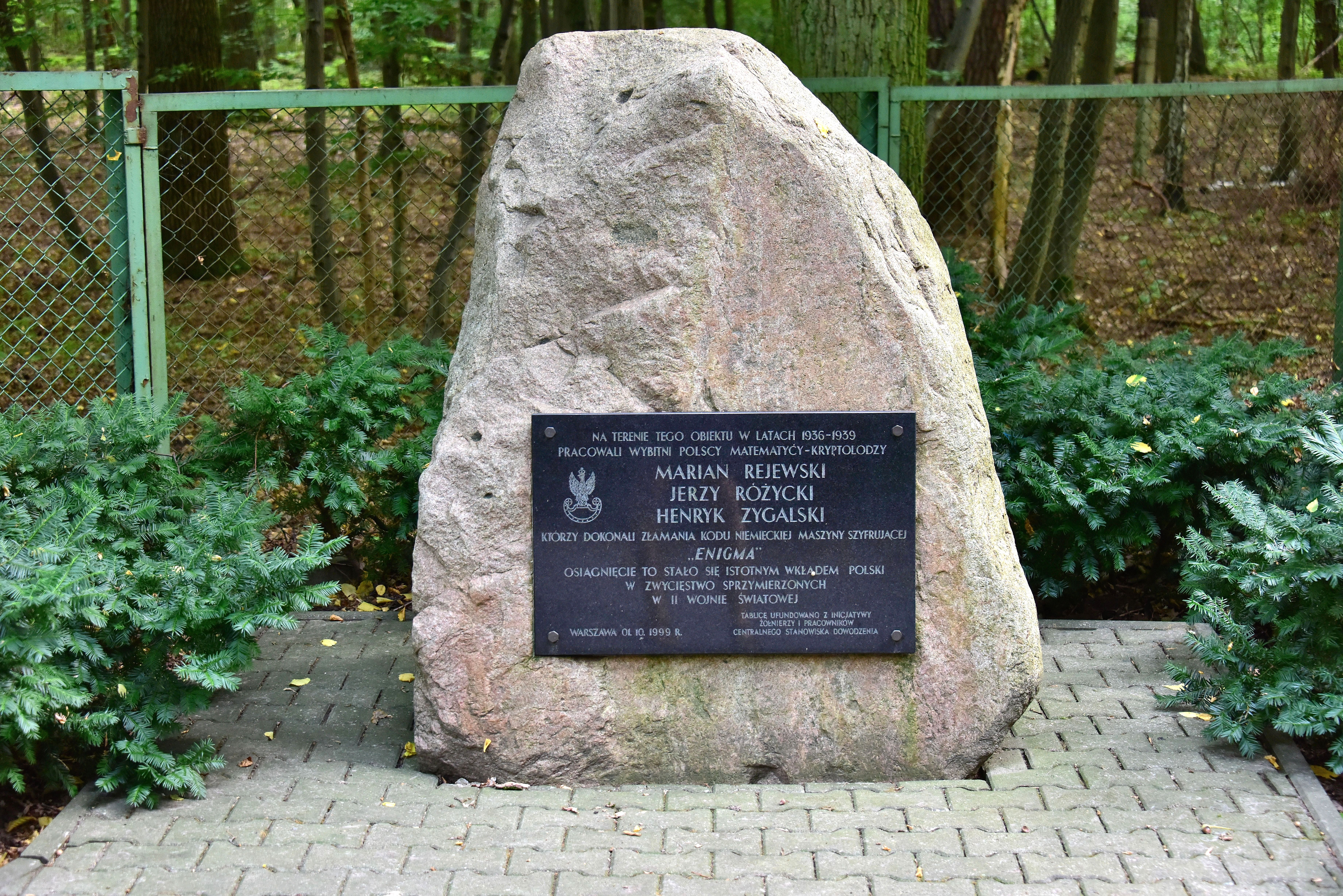 Kamień i tablica upamiętniająca Mariana Rejewskiego, Jerzego Różyckiego i Henryka Zygalskiego przy ul. Leśnej w Lesie Kabackim w Warszawie